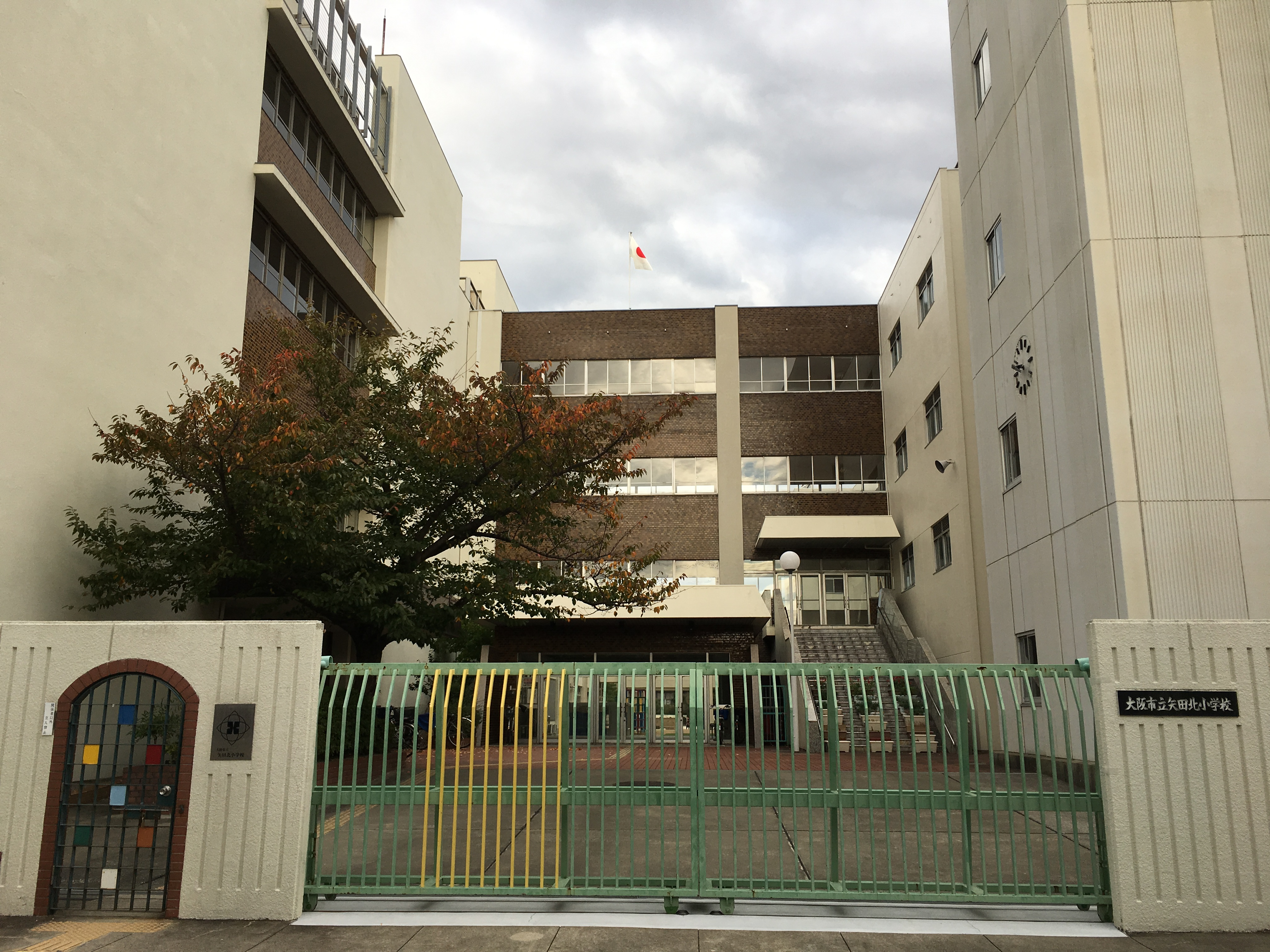 矢田北小学校